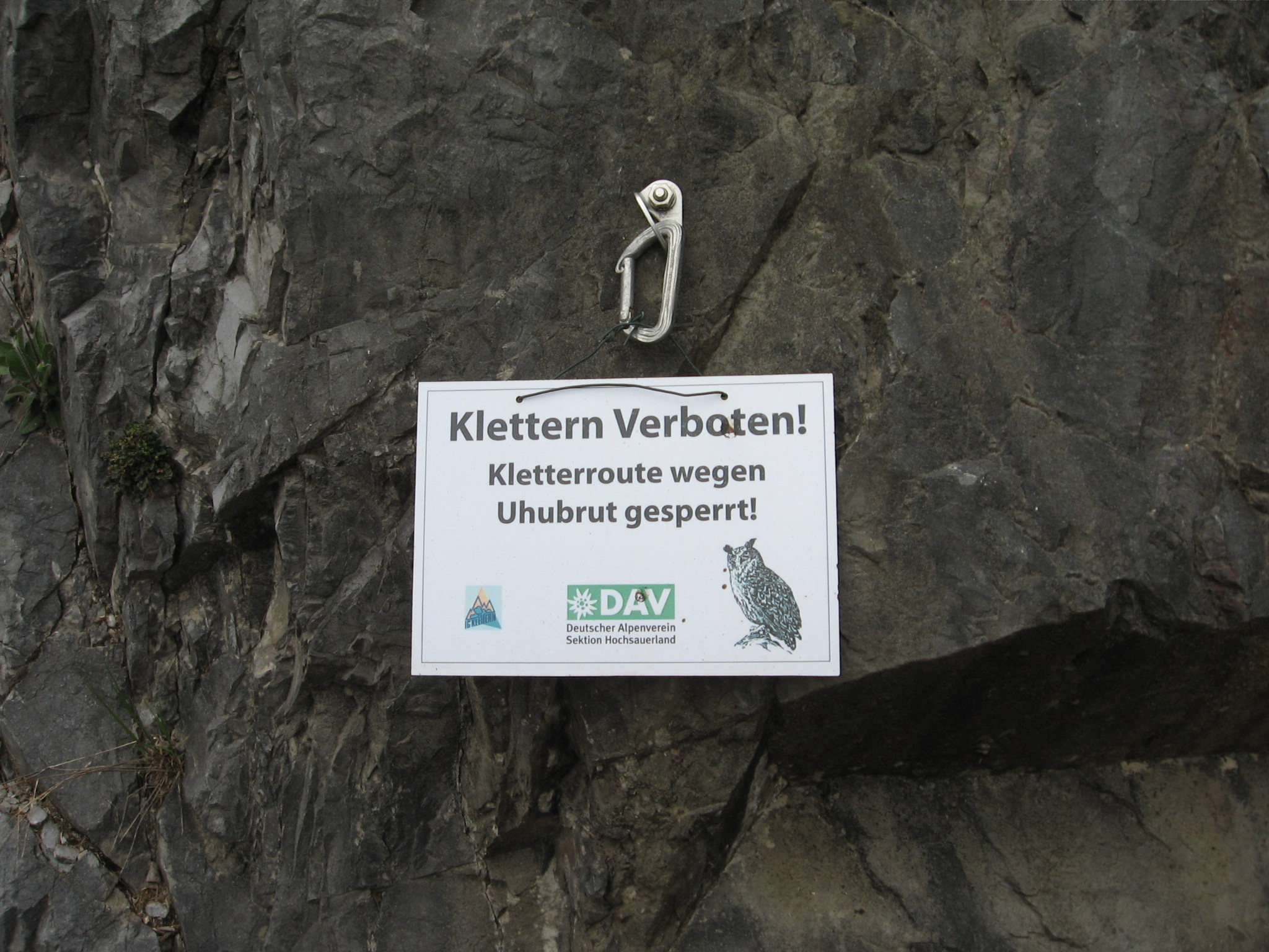 Schild "Klettern Verboten! Kletterroute wegen Uhubrut gesperrt!" von IG Klettern NRW und Deutscher Alpenverein Sektion Hochsauerland in einem Klettersteinbruch im Stadtgebiet von Balve (NRW).